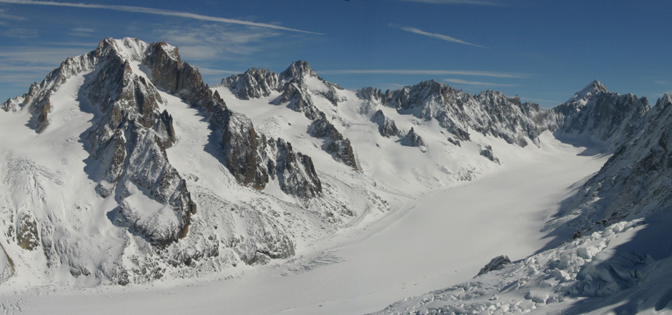 Aiguille d'Argentiere (links oben), Tour Noir, Mont Dolent, in der Bildmitte: Glacier d'Argentiere